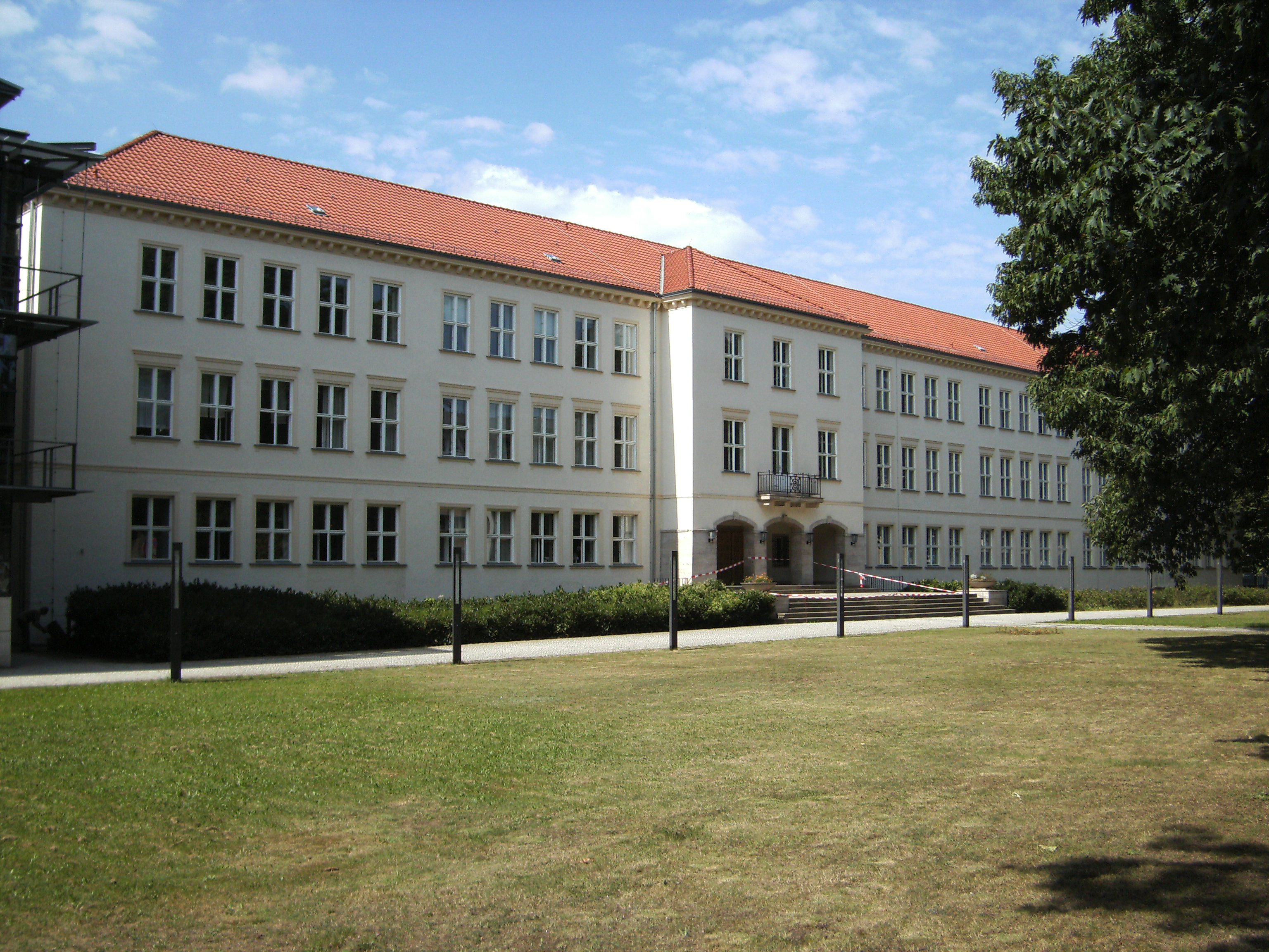 Oberstufenzentrum 4, Ansicht